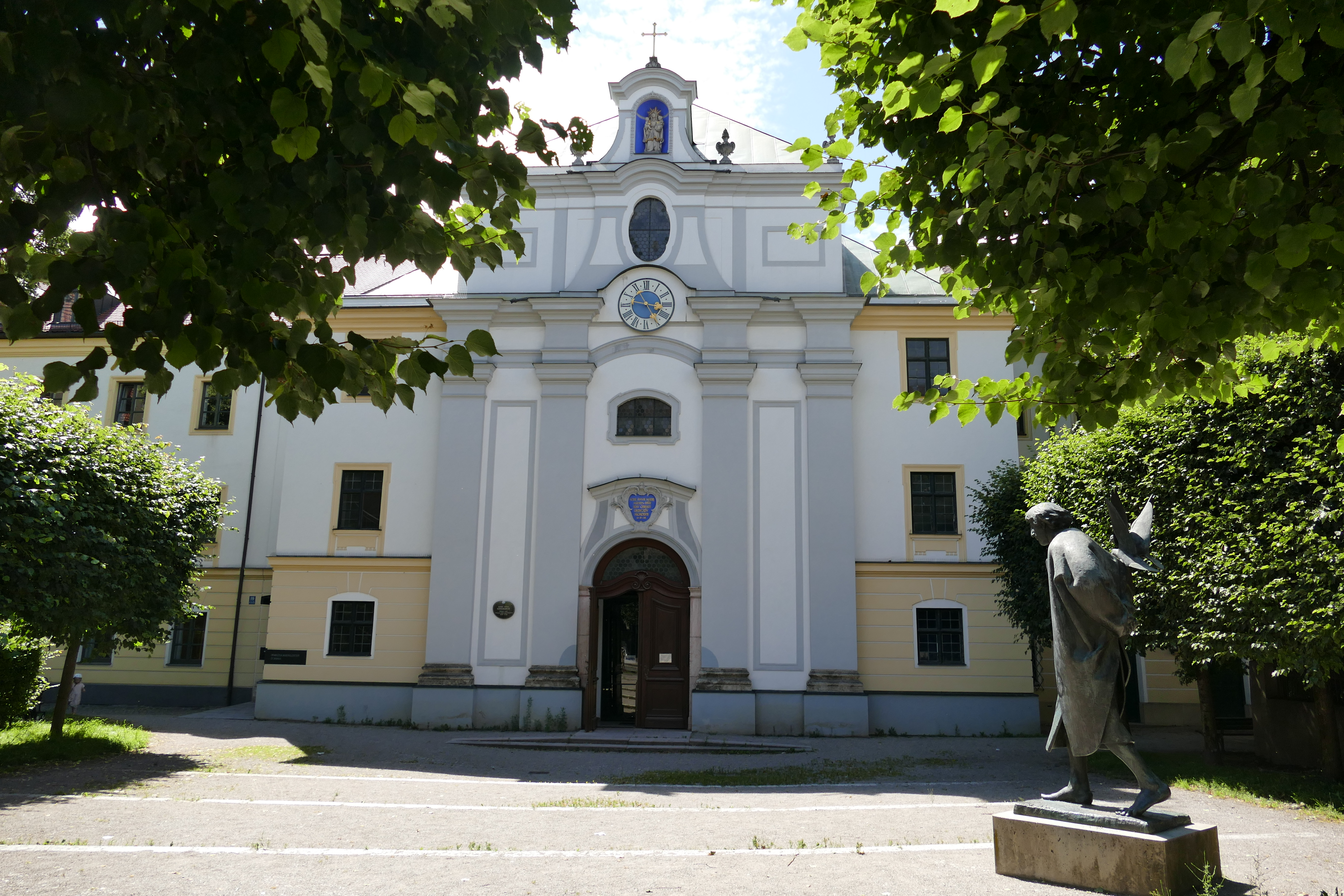 Klosterkirche St. Anna im Lehel